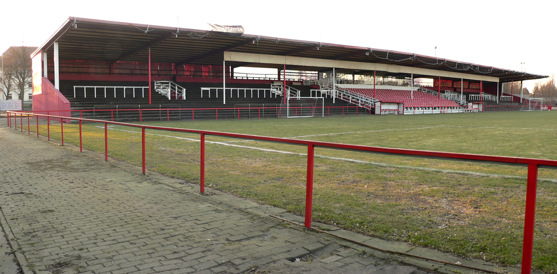 Oststadtstadion Hannover